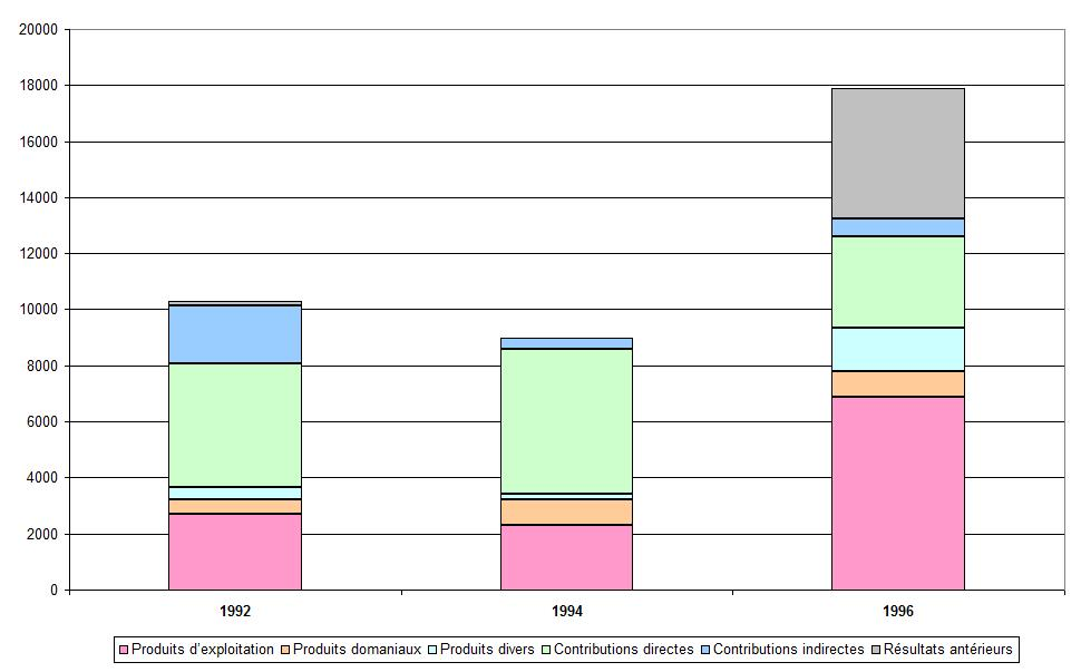 Recettes budgétaires de la commune de Tougan (Burkina faso), entre 1992 et 1996, en euros.